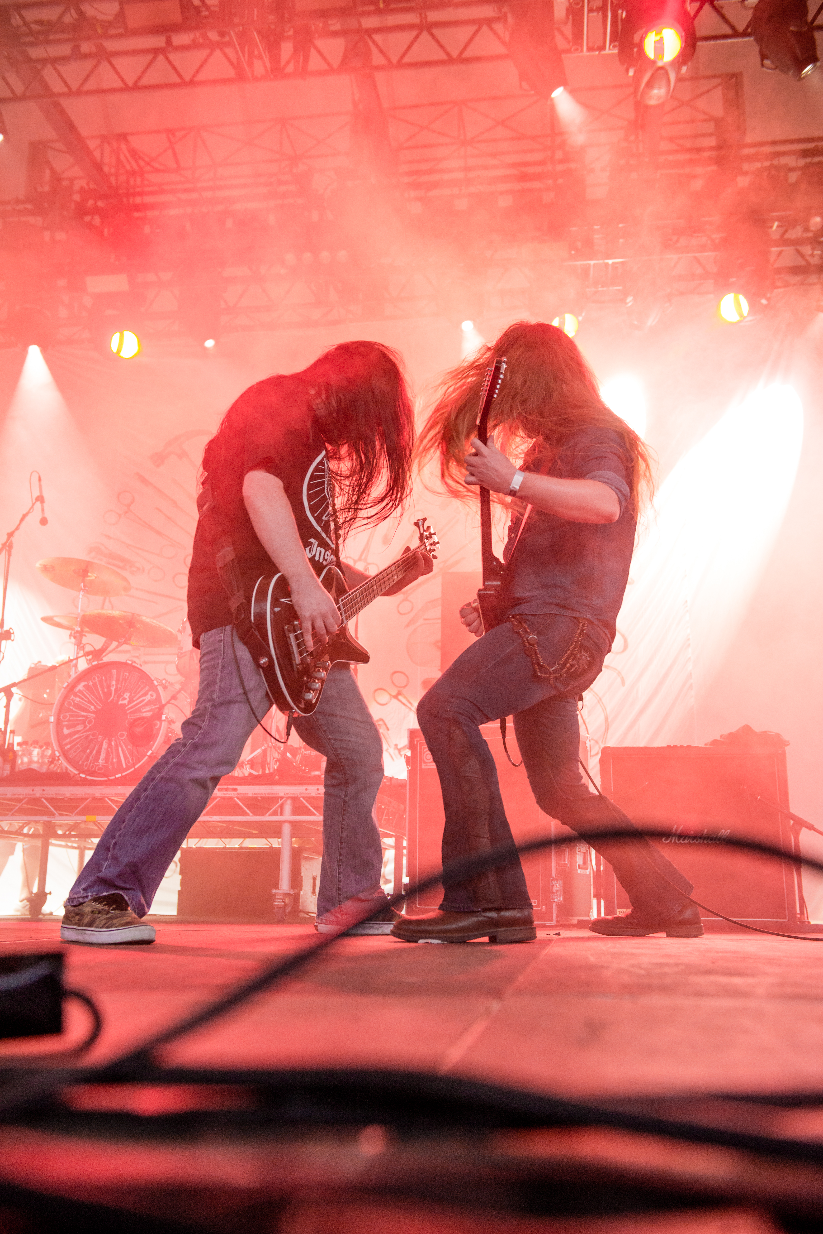 'Rock Hard Festival 2014 - Gelsenkirchen': 'Carcass'